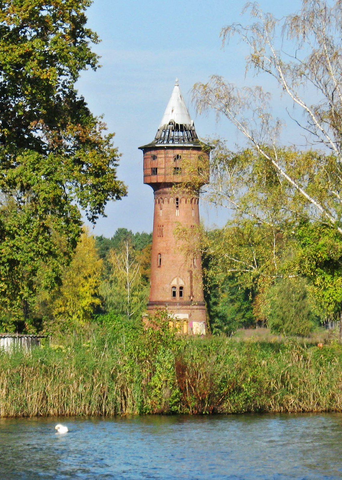 Blick vom Krüpelsee auf den Wasserturm von Zernsdorf